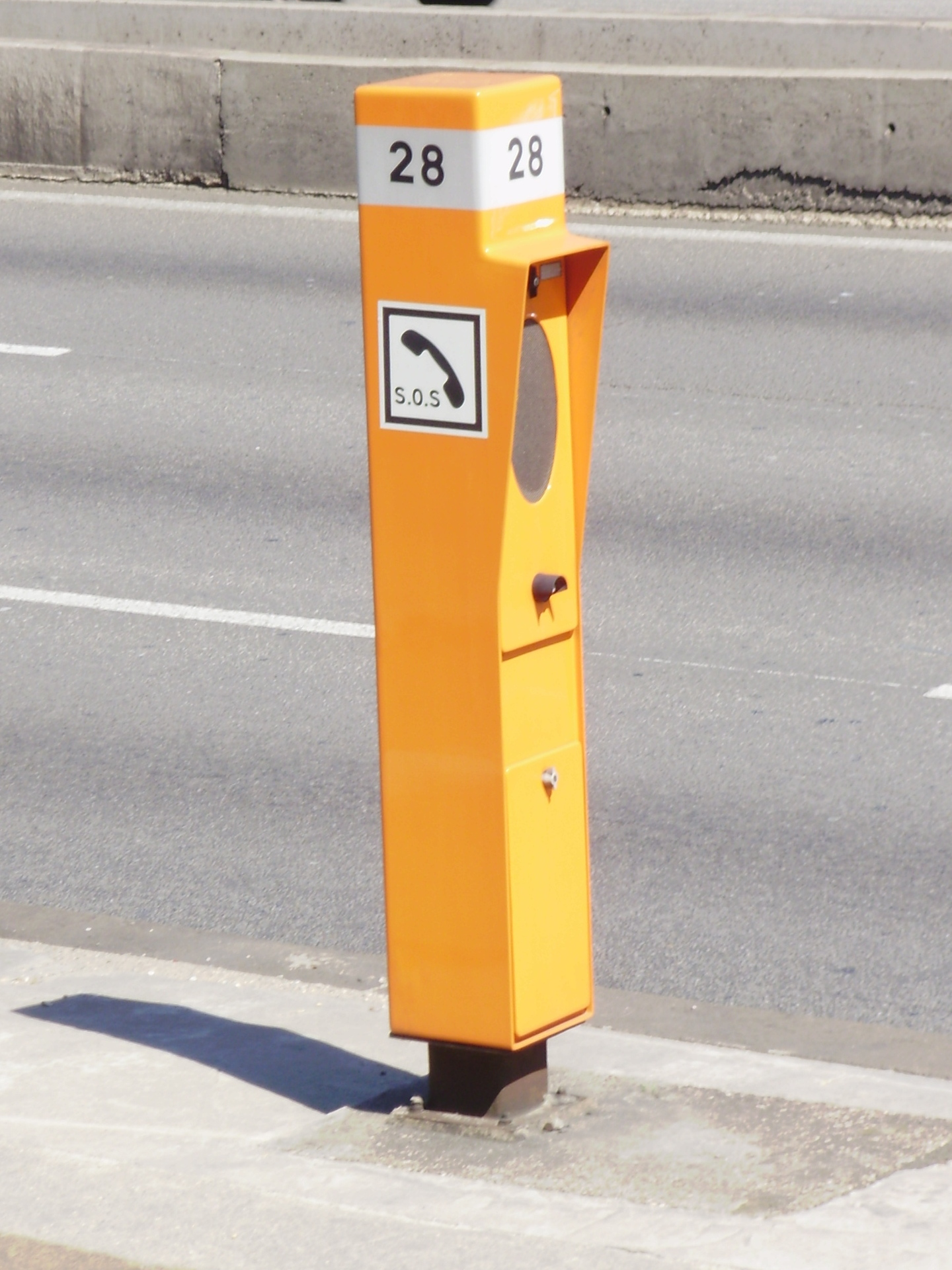 Borne d'appel d'urgence 28, située sur le boulevard périphérique de Paris, en France, près d'une bretelle d'entrée sur sa chaussée extérieure, un peu à l'est de l'avenue de la Porte-de-Vanves.